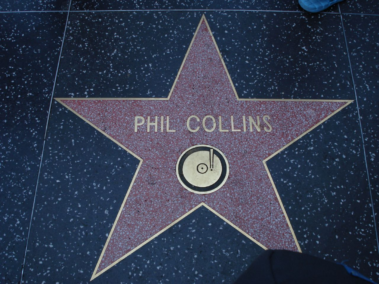 Estrella de Phil Collins en el Paseo de la Fama, California, EEUU